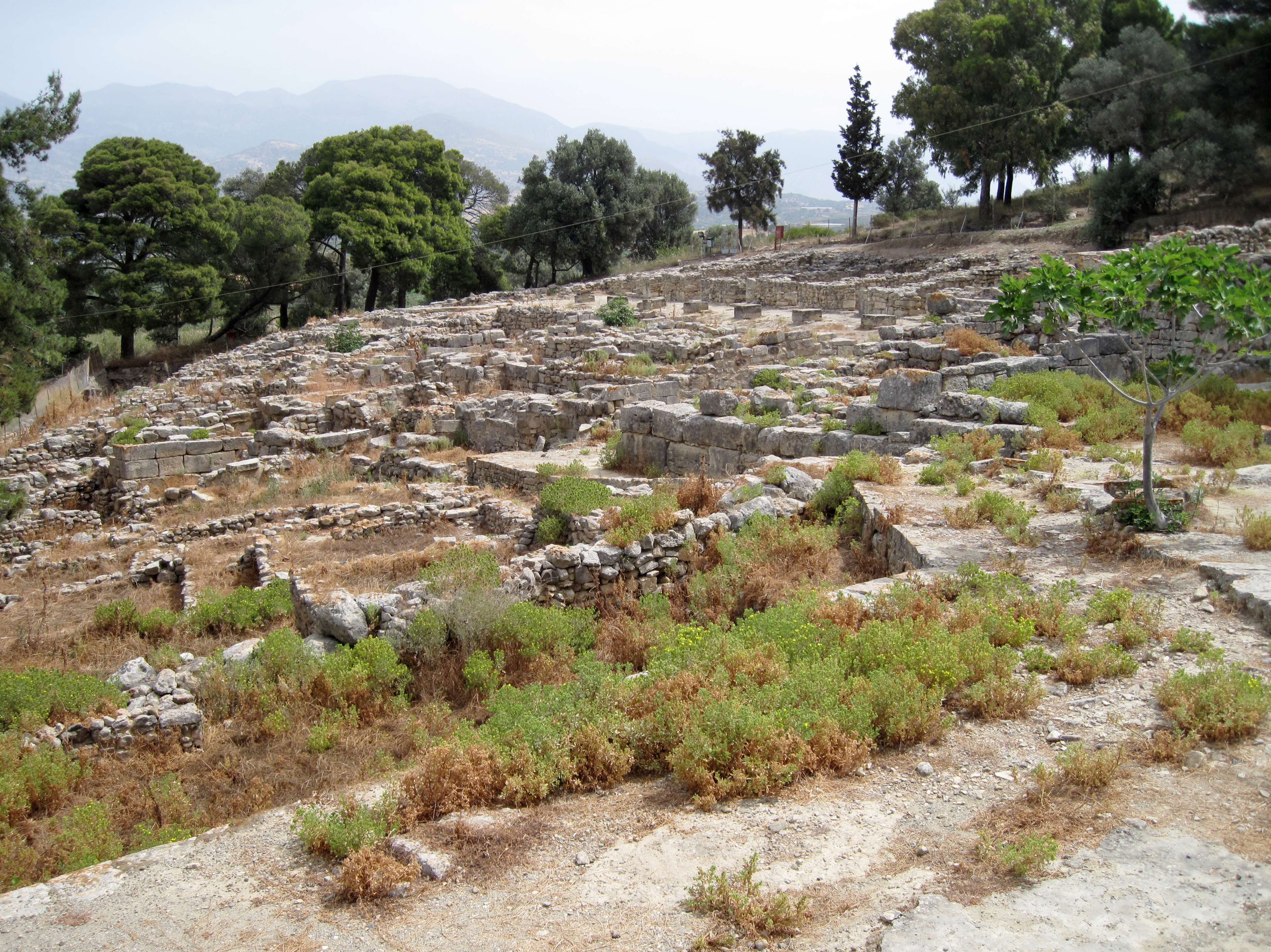 Ausgrabungsstätte von Agia Triada in der Gemeinde Festos, Regionalbezirk Iraklio, Kreta, Griechenland